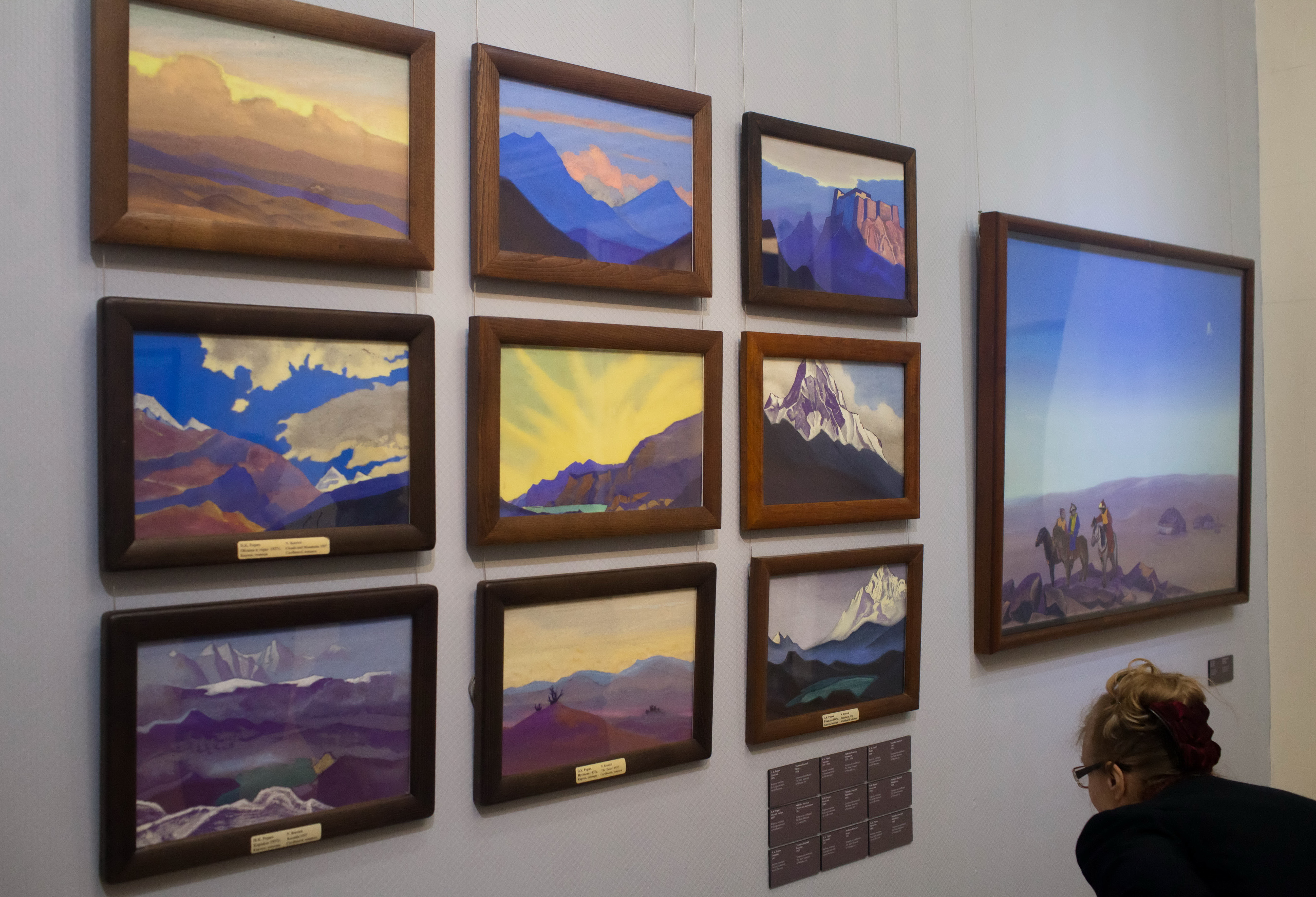 Выставка "Николай Рерих. Восхождение" в Музее Рерихов (Усадьба Лопухиных, Малый Знаменский переулок, д.3/5, стр.4; 20 декабря 2017 – 17 января 2018)